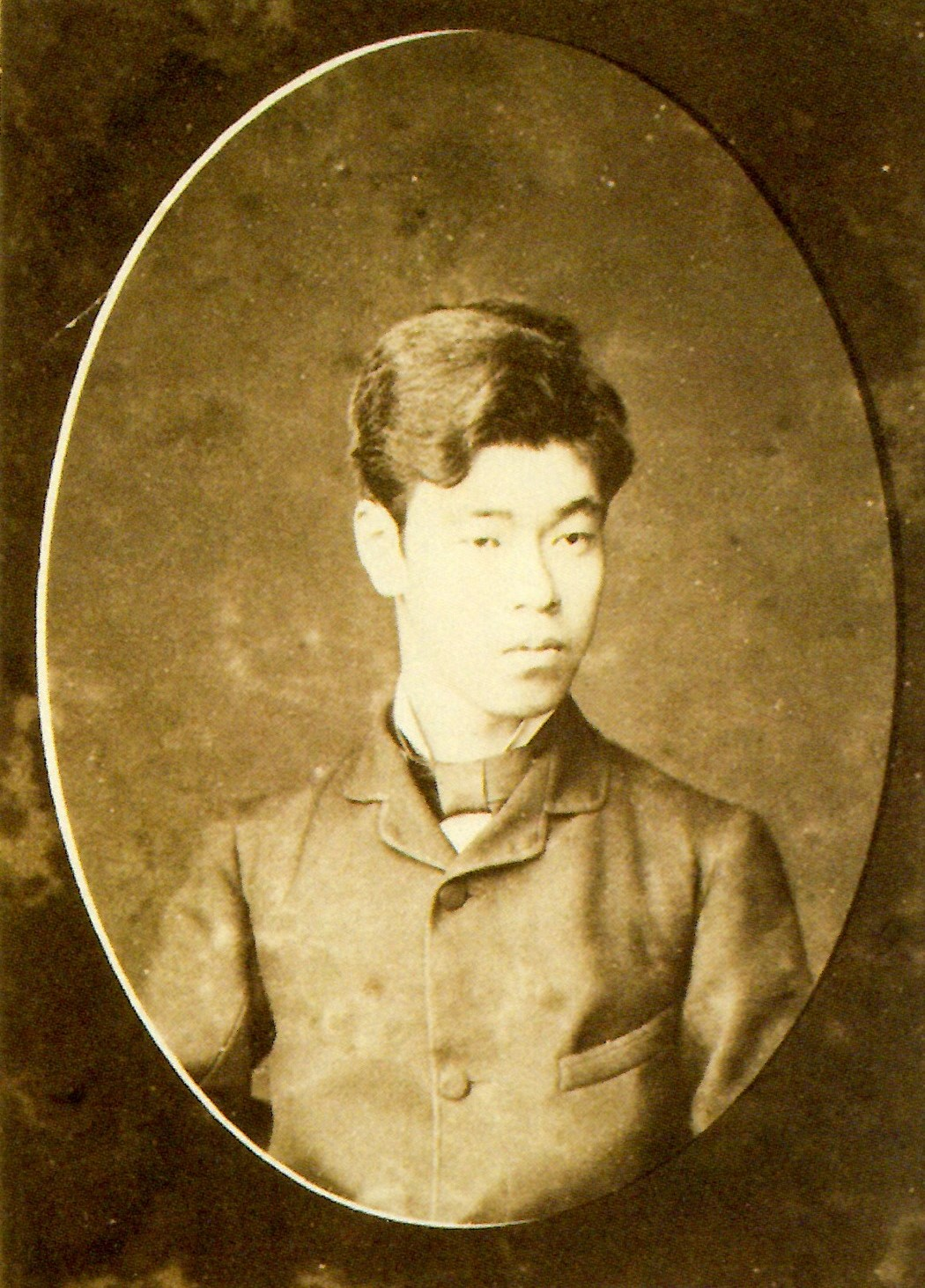 亀井玆明の肖像写真。